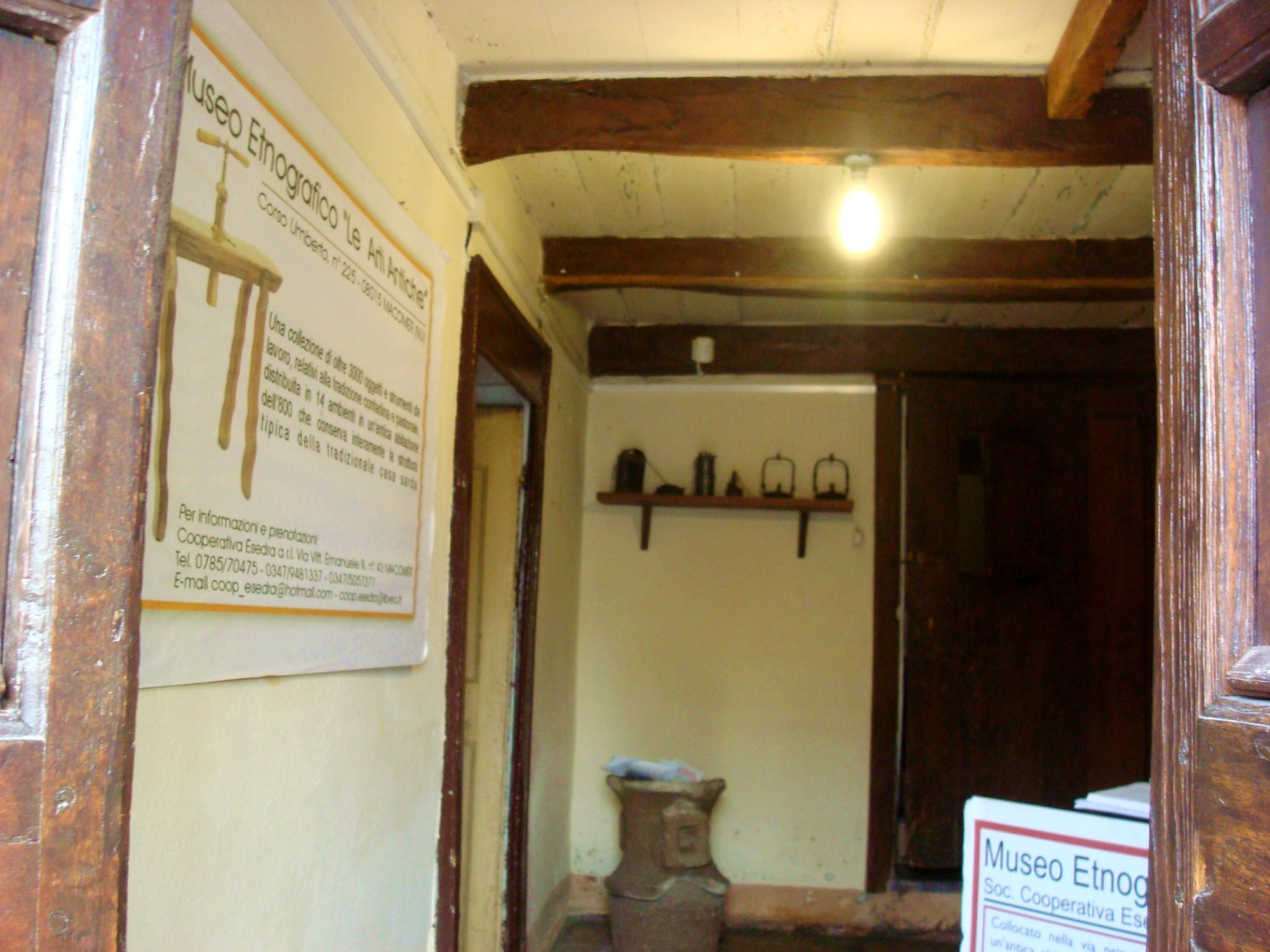 Museo etnografico "Le arti antiche" in corso Umberto a Macomer.